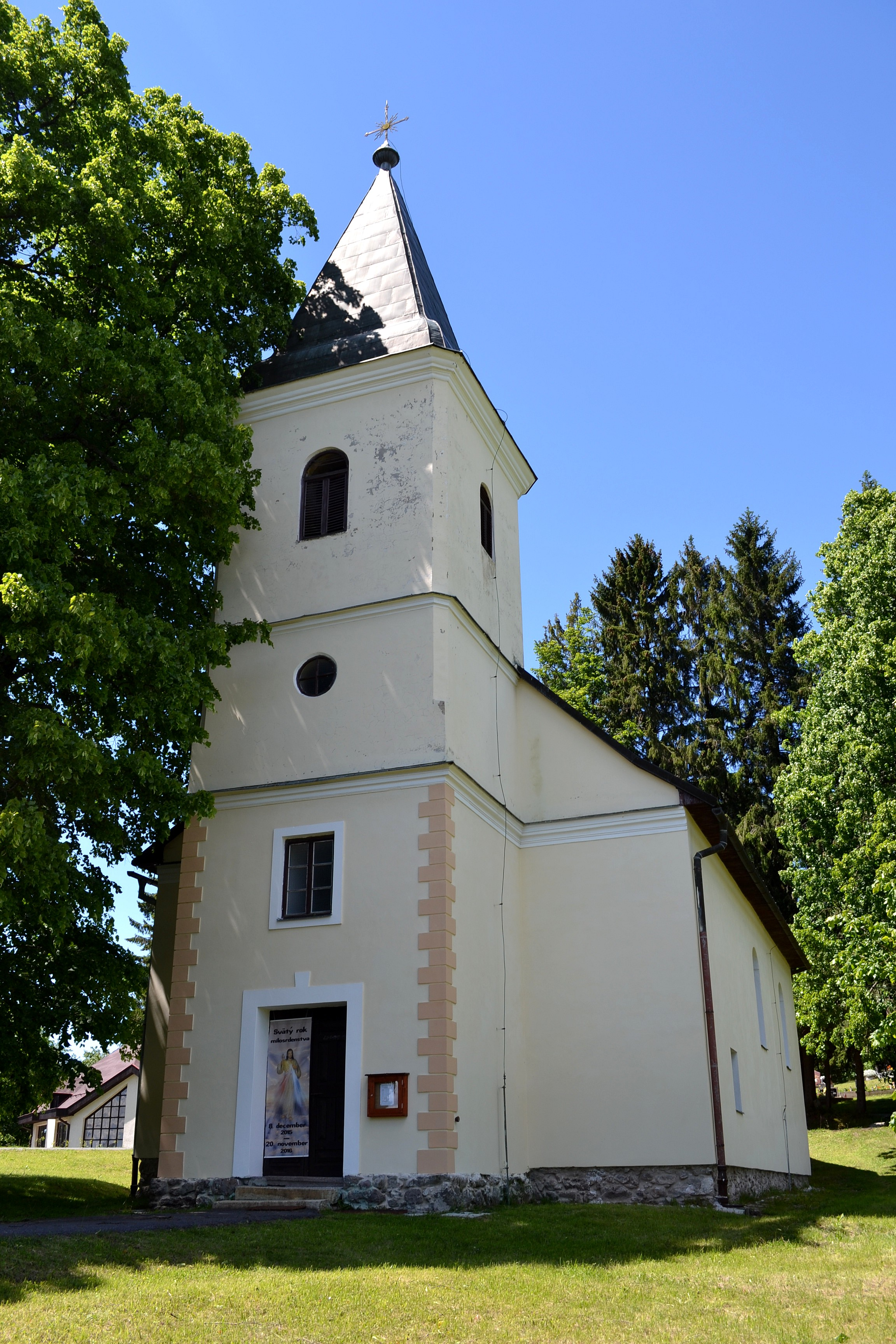 Krahule (okr. Žiar nad Hronom), Kostol svätého Jána Nepomuckého